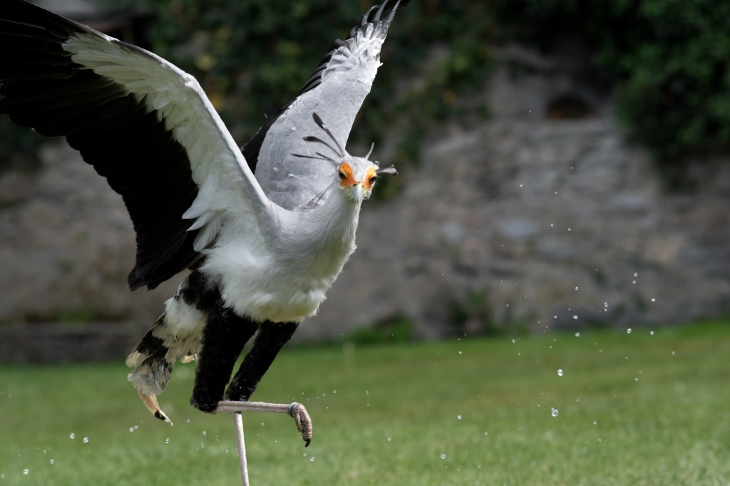 Sagittarius serpentarius à Beaucens dans les Pyrénées.